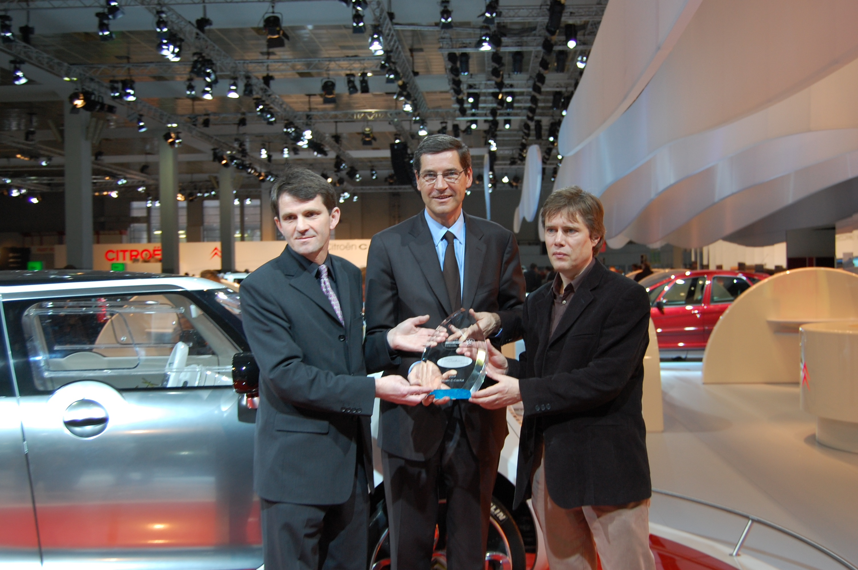 Gilles Michel (au centre) recevant le "Prix de l'Innovation Technologique" pour C-Cactus au Salon de l'Auto de Bruxelles en janvier 2008